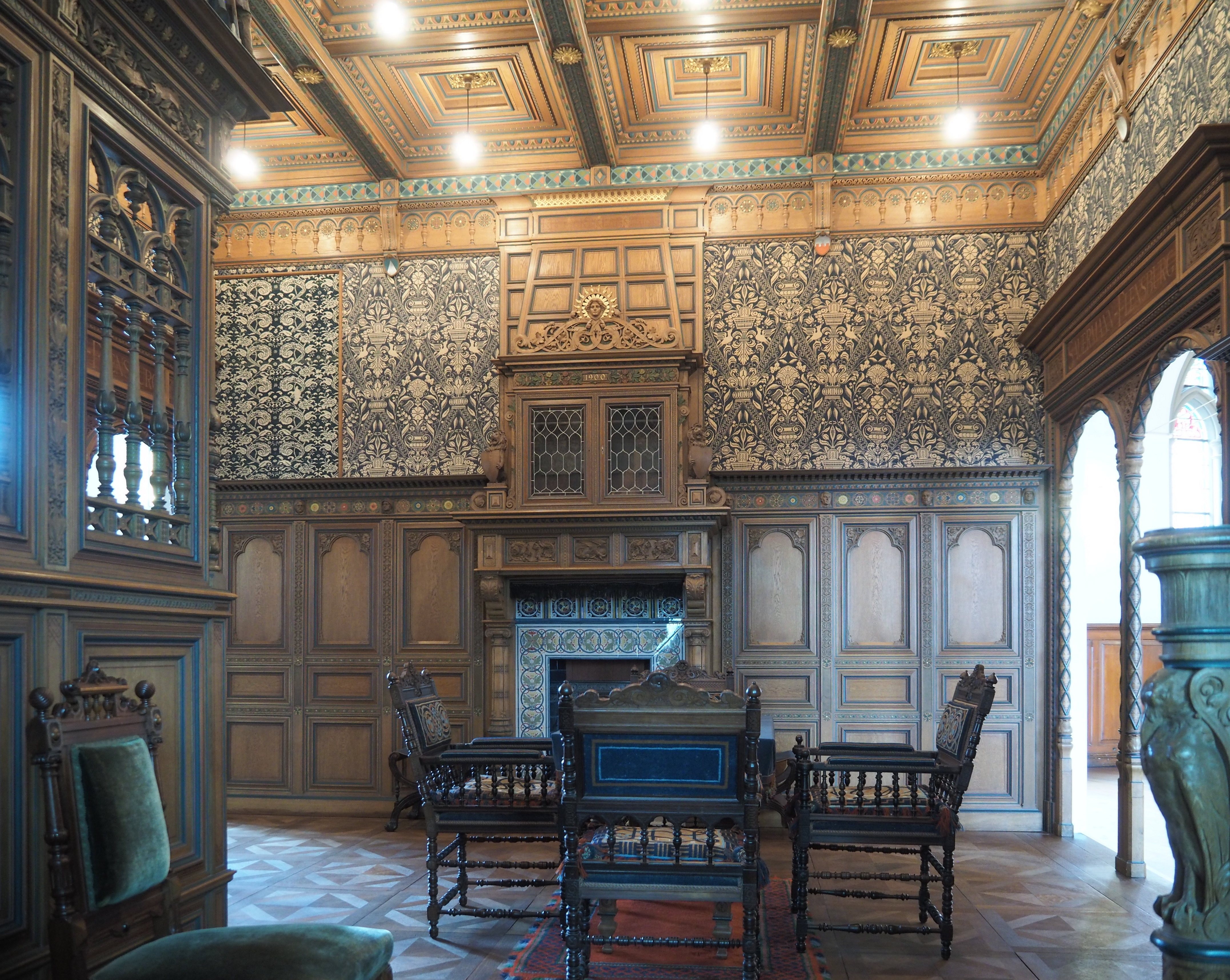 Niederdeutsches Wohnzimmer, sogenanntes "Pariser Zimmer" im Hans-Christiansen-Haus auf dem Museumsberg, Flensburg - Von Heinrich Sauermann für die Pariser Weltausstellung 1900